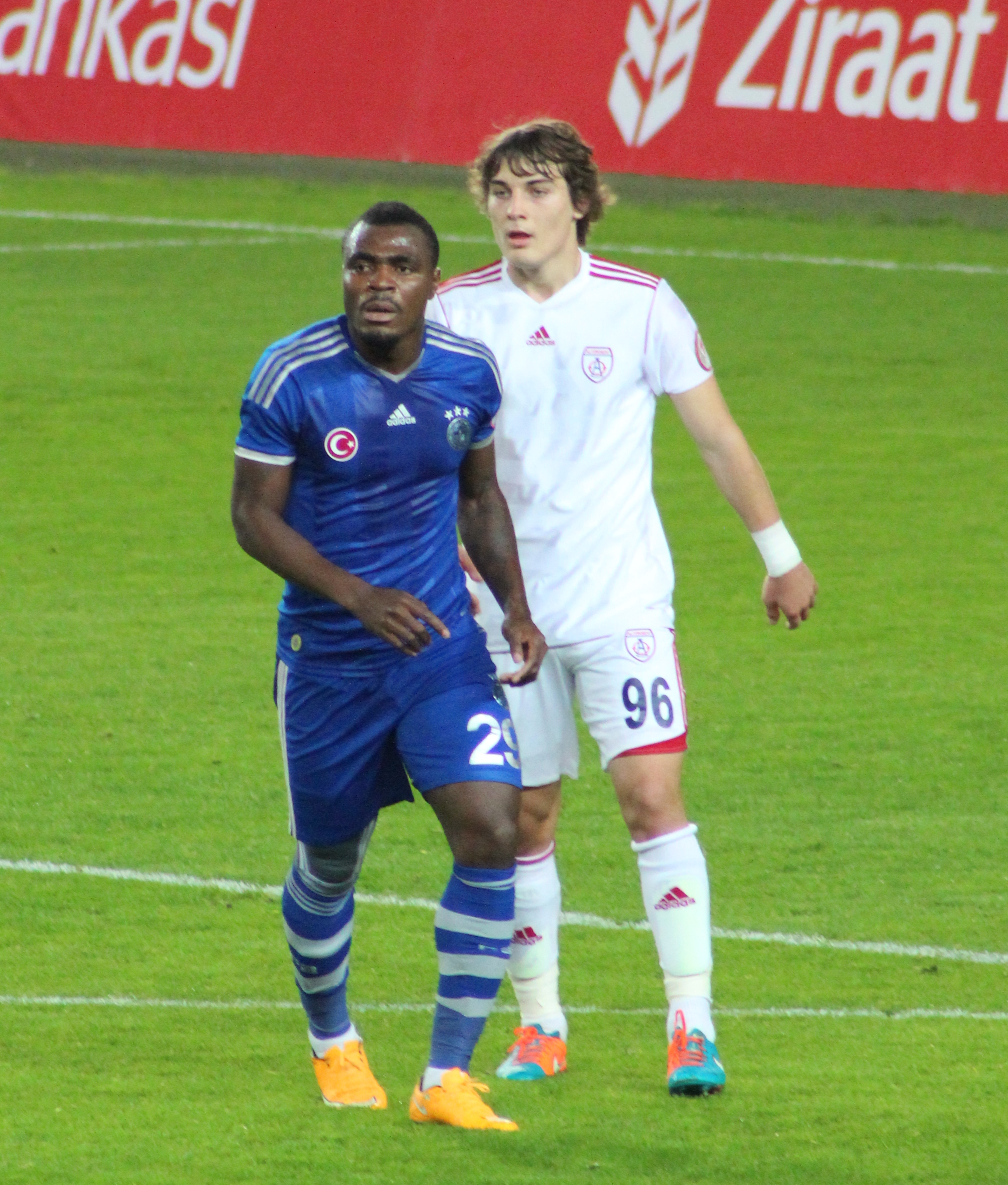 Emenike & Caglar Soyuncu @ Fenerbahce - Altinordu 23 December 2014